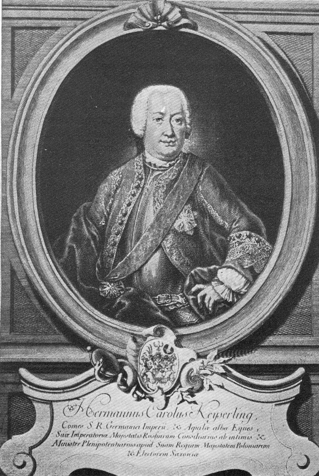 Gravure van Keiserlingk, Hermann Carl von Keyserlingk